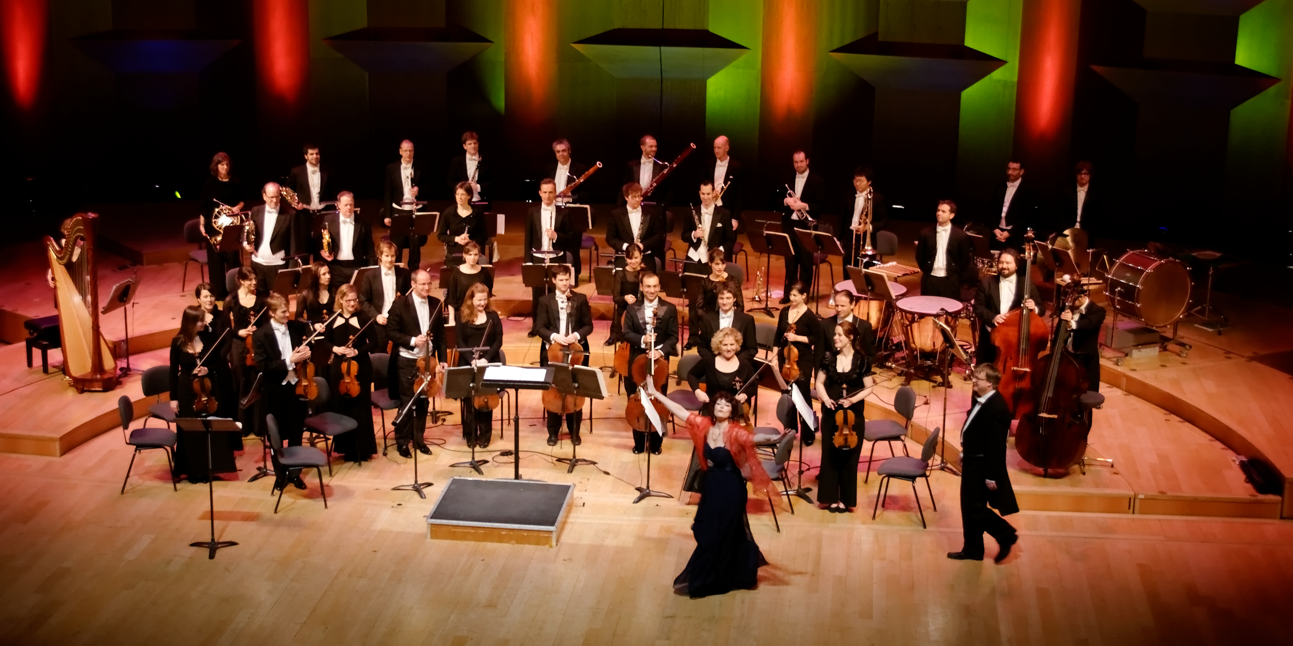 Orchestre de chambre de Bâle (Kammerorchesterbasel) sous la direction de Philippe Bach avec la participation de Jennifer Larmore. Auditorium Maurice-Ravel, Lyon 2013